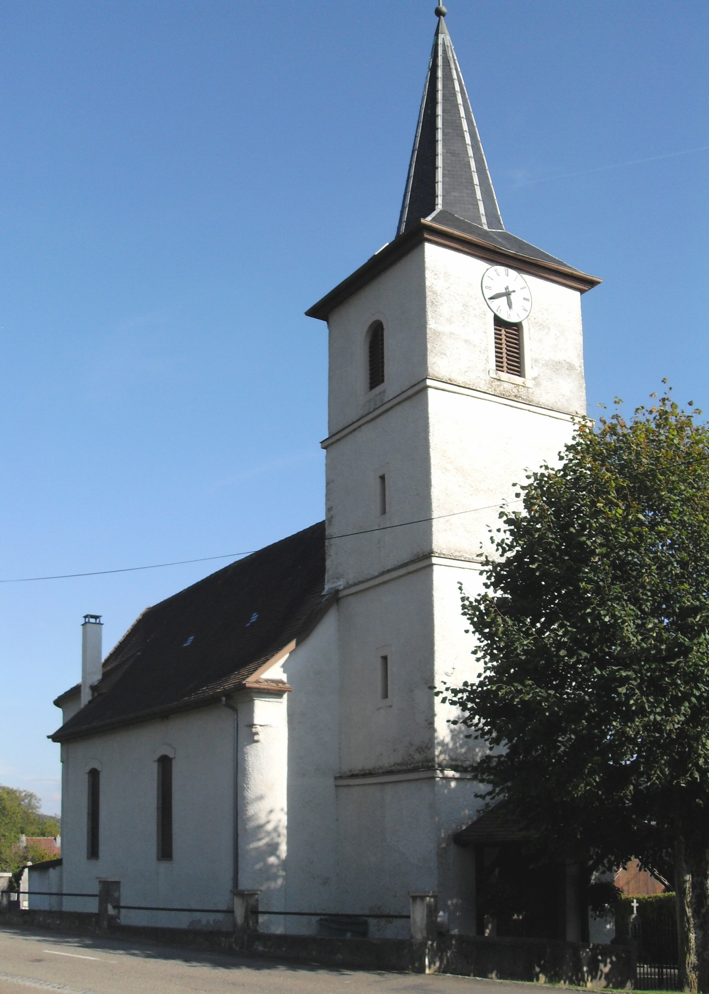 L'église Saint-Pierre, Saint-Paul à Kiffis